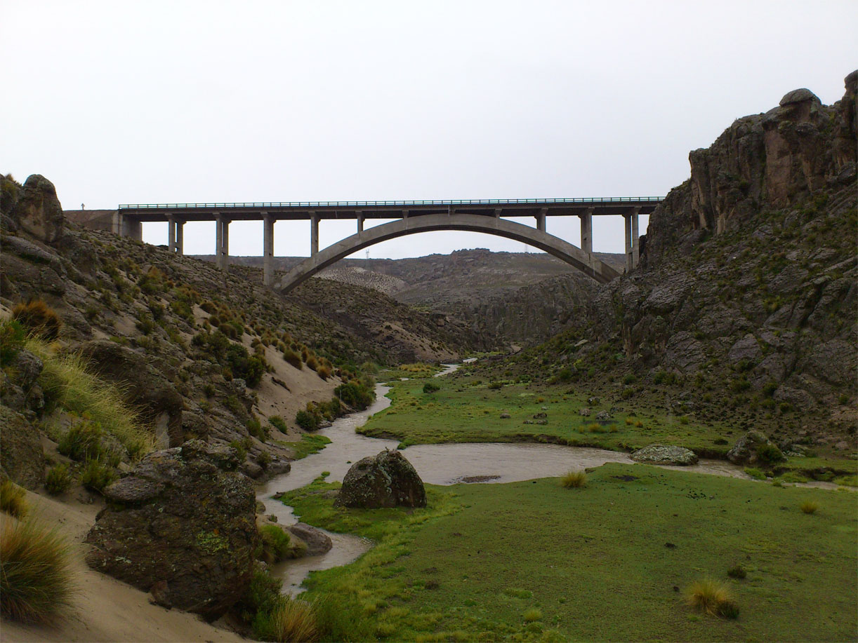 Puente sobre el Rio San Juán, Potosí